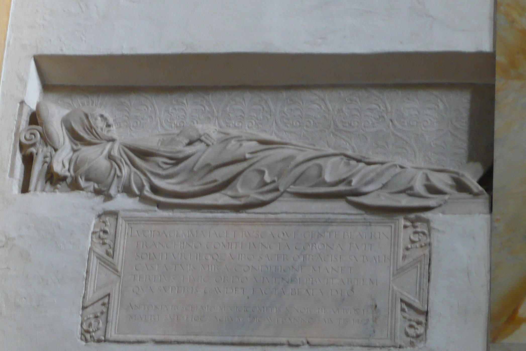 Sepolcro nel transetto della chiesa di Sant'Angelo a Milano